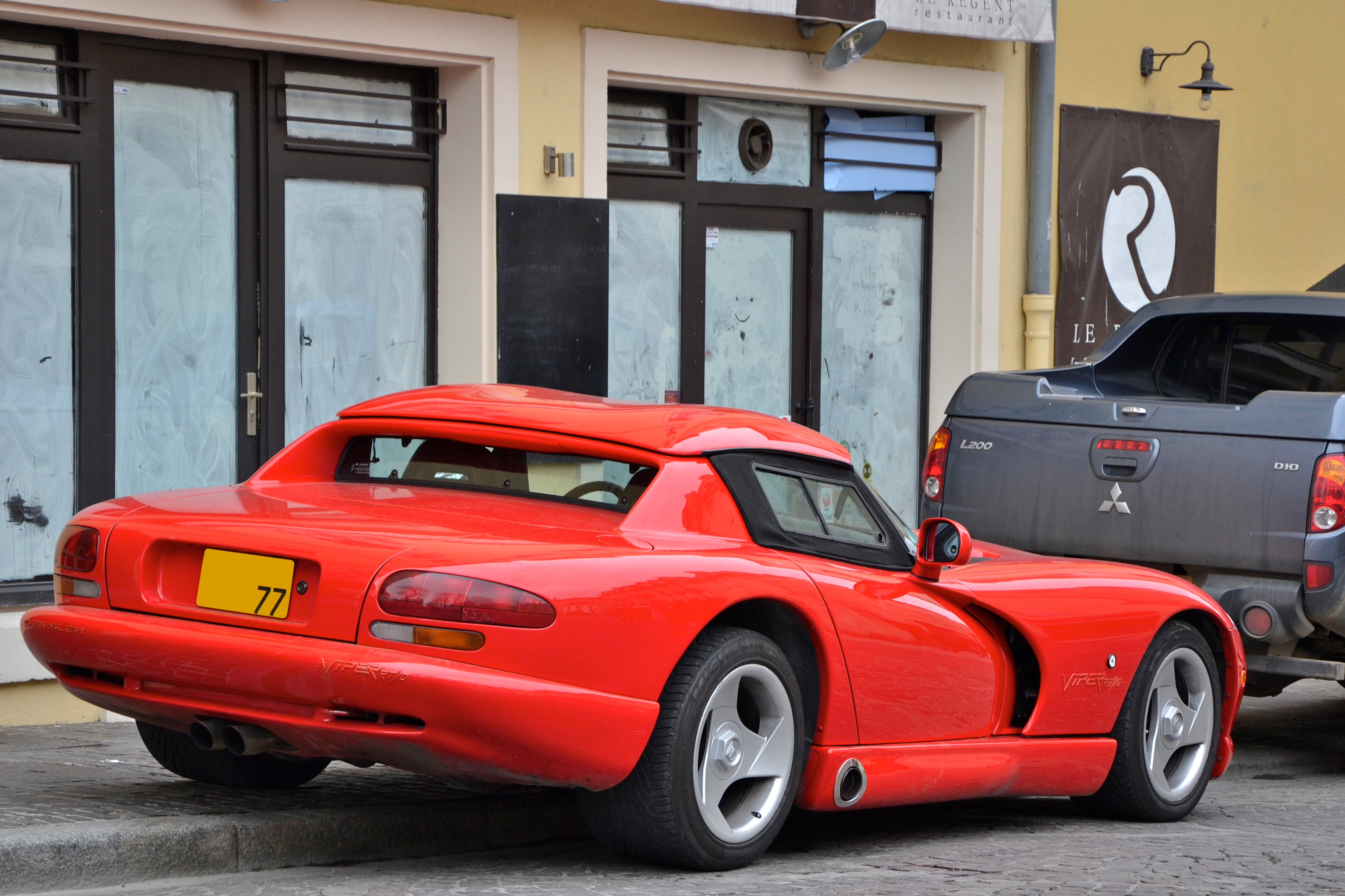 Dodge Viper RT/10